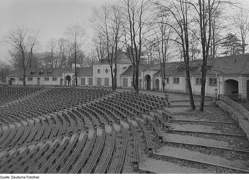 Original image description from the Deutsche Fotothek Dresden. Großer Garten, Freilichtbühne Junge Garde